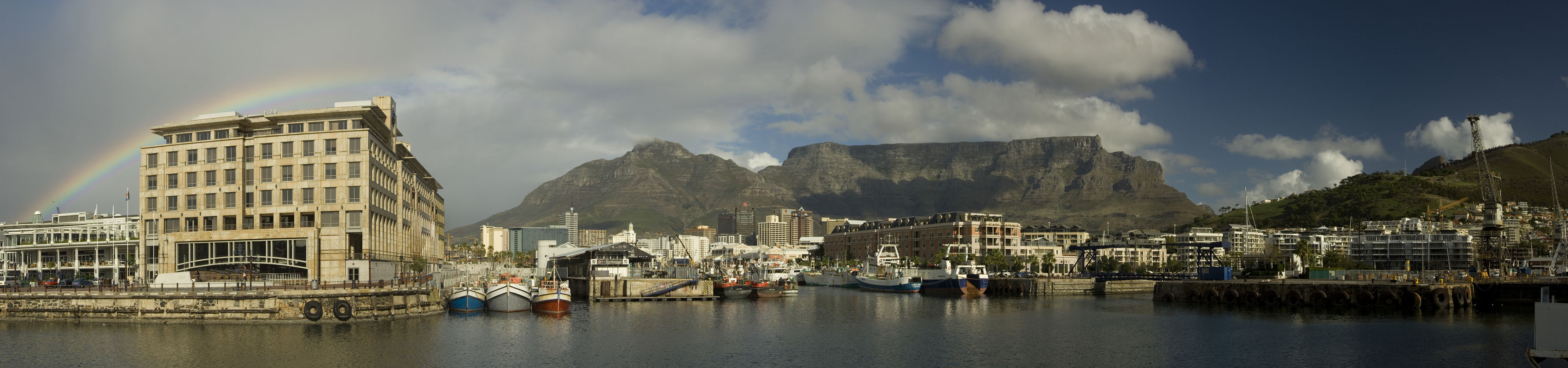 Panorama von Kapstadt und dem Tafelberg, aufgenommen von der Waterfront im Mai 2007